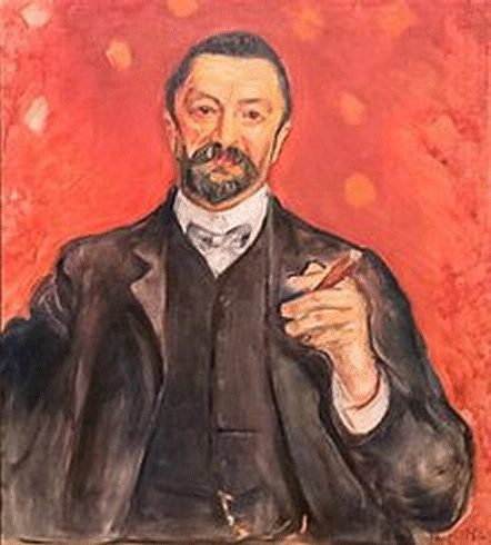 Portrait (1906) par Edvard Munch (vue partielle), Van Gogh Museum